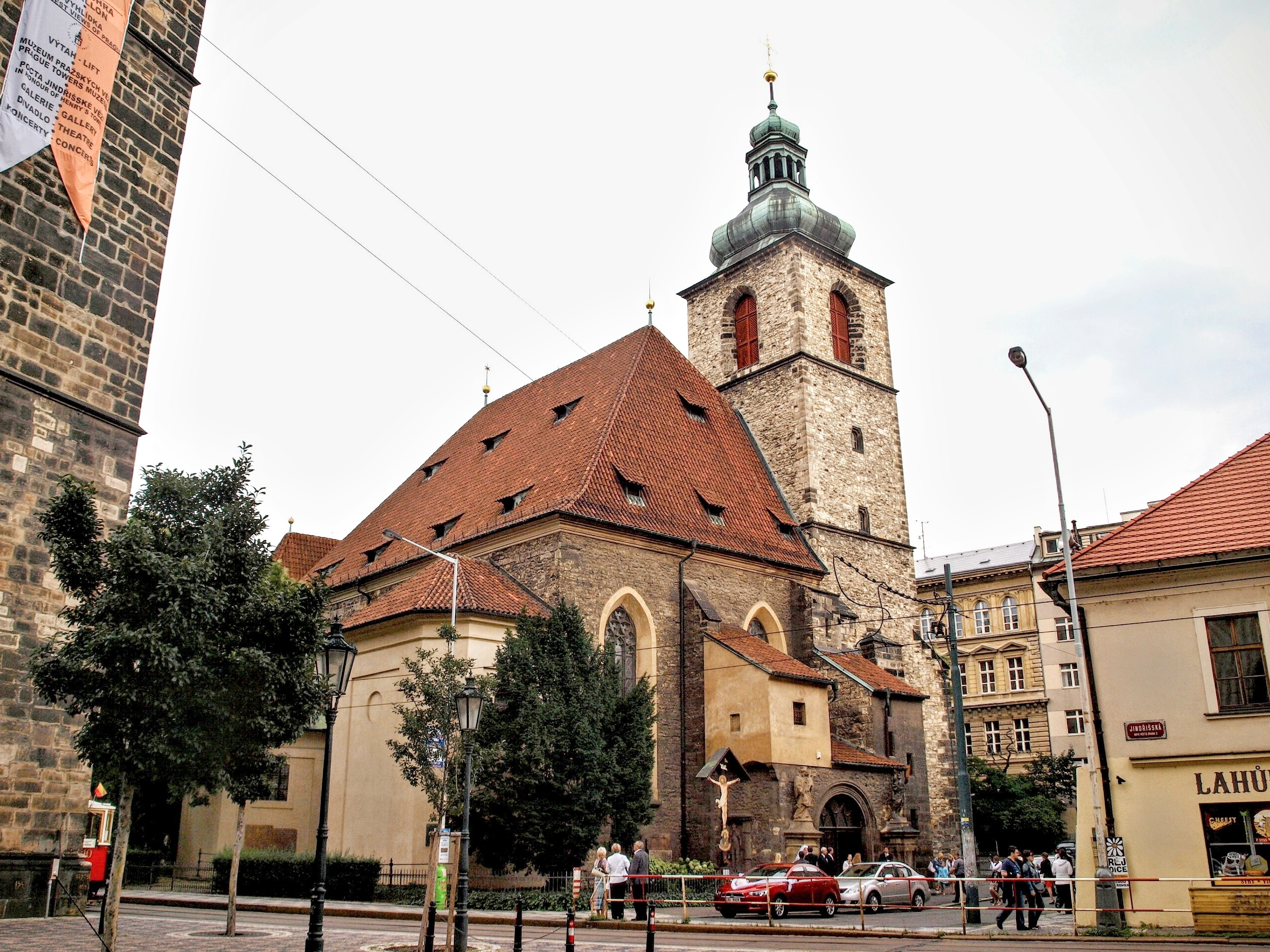 Praha, kostel sv. Jindřicha